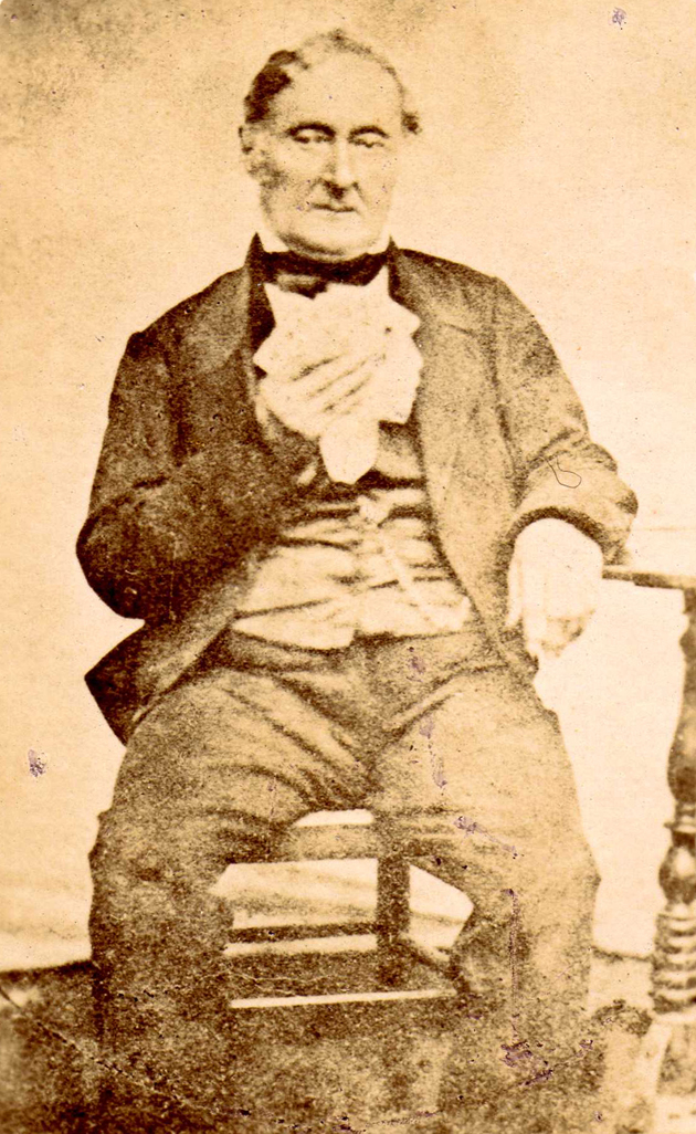 Prestidigitateur Belge, né à Waasmunster en 1784, décédé à Paris en 1859